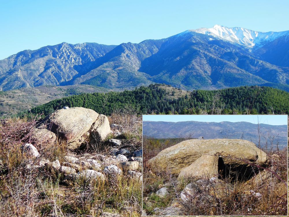 Dolmen Serrat d'En Parot, Corneilla-de-Conflent